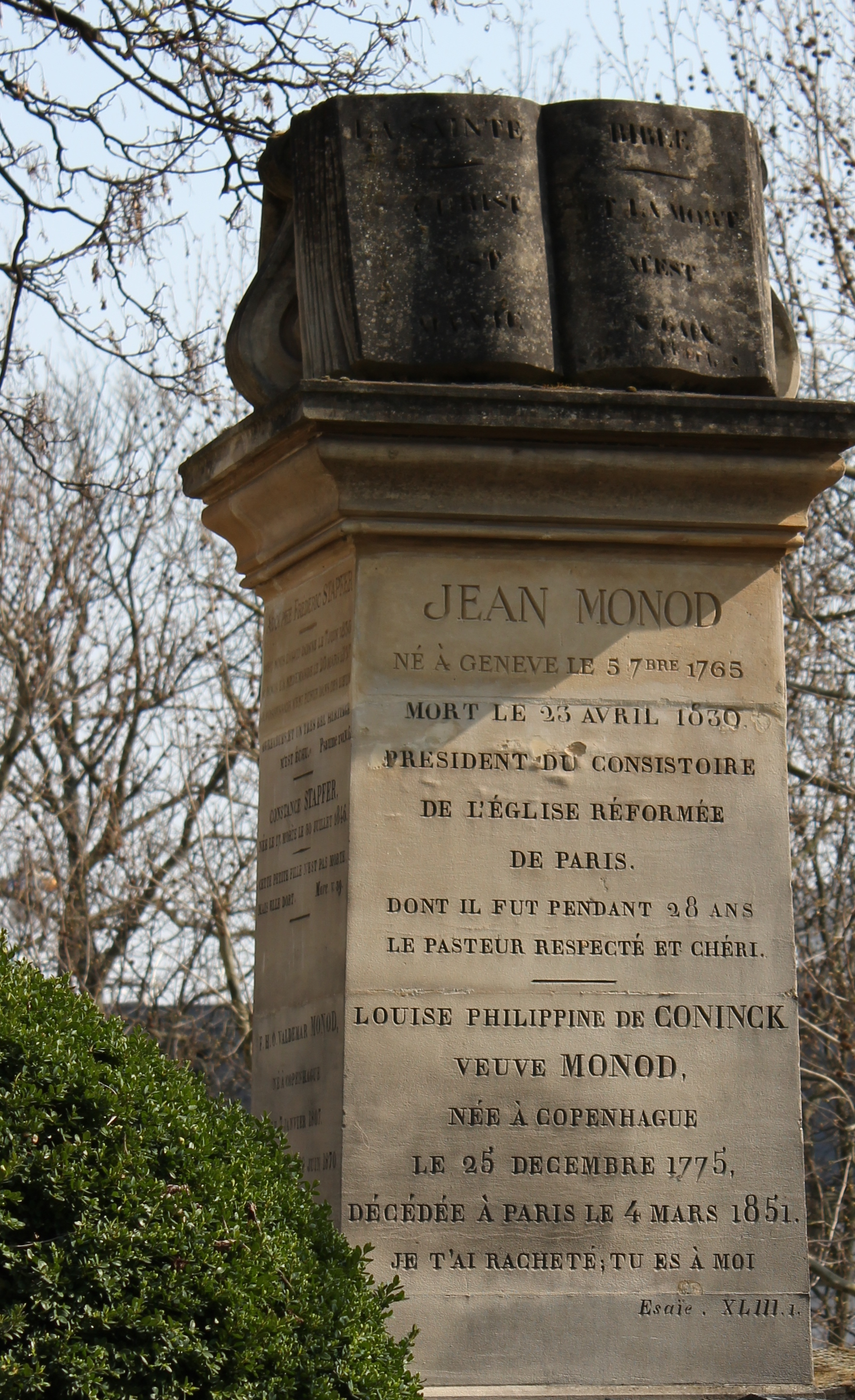 Sépulture de la famille Monod, famille de pasteurs, dont Adolphe Monod (1802-1856). Sépulture surmontée d'une Bible.inscriptions